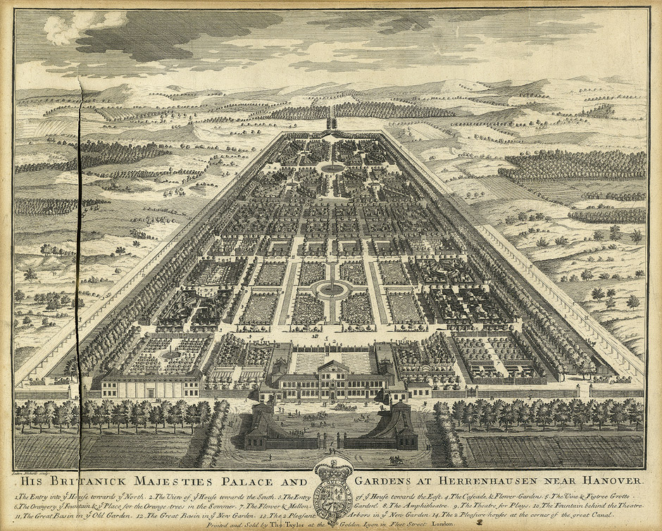 Schloß Herrenhausen. His Britanick Majesties Palace and Gardens at Herrenhausen near Hanover. Gesamtansicht aus der Vogelperspective. Kupferstich. 42 x 53 cm. Sutton Nicholls sculp. Printed and Sold by Tho. Taylor ... London. Um 1730.